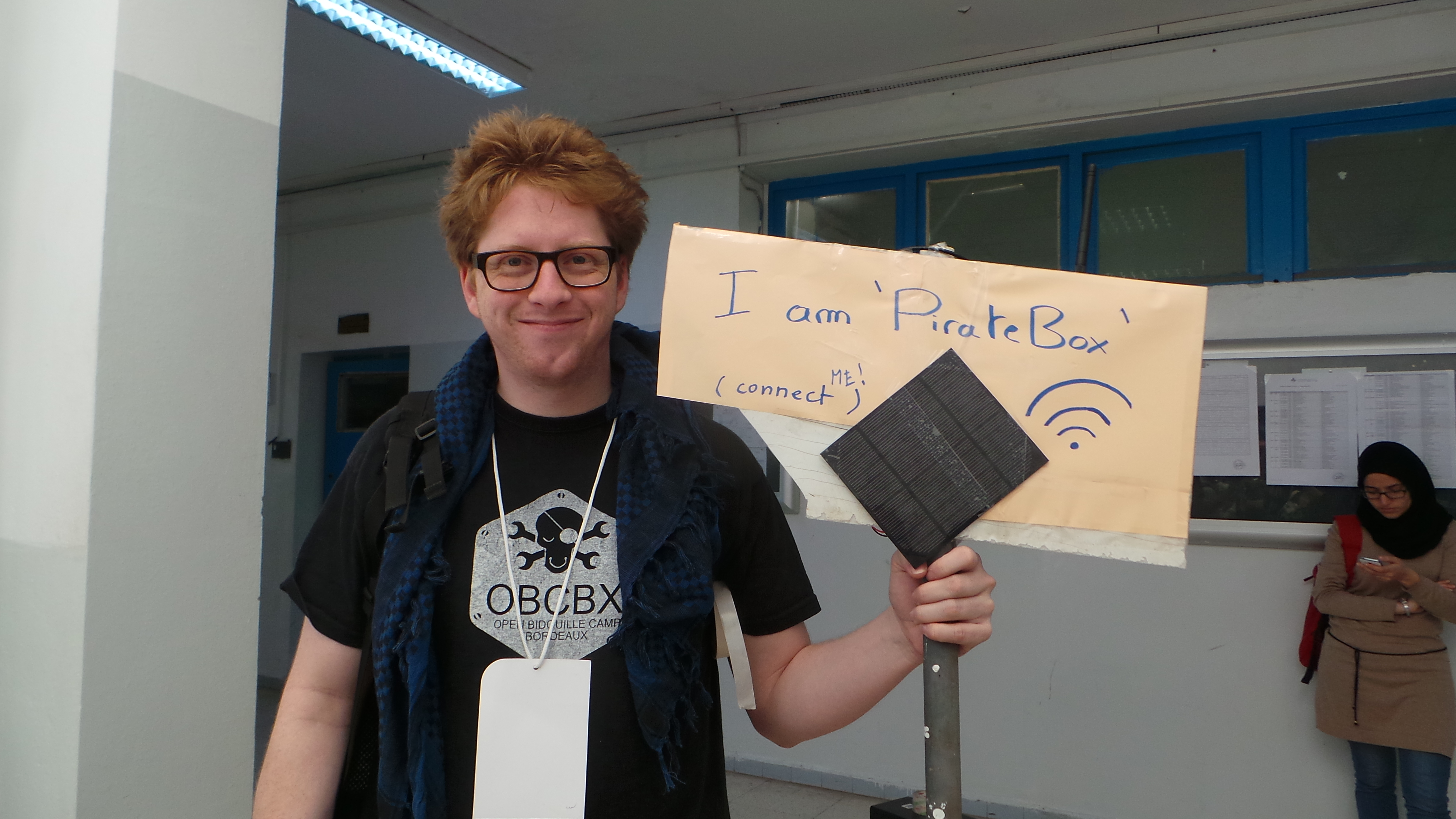 Activista de Pirate Box en el Foro Social Mundial Tunis 2015